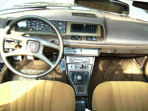 Intérieur Peugeot 604 Série 2 (modèle TI intérieur marron sièges tissus)